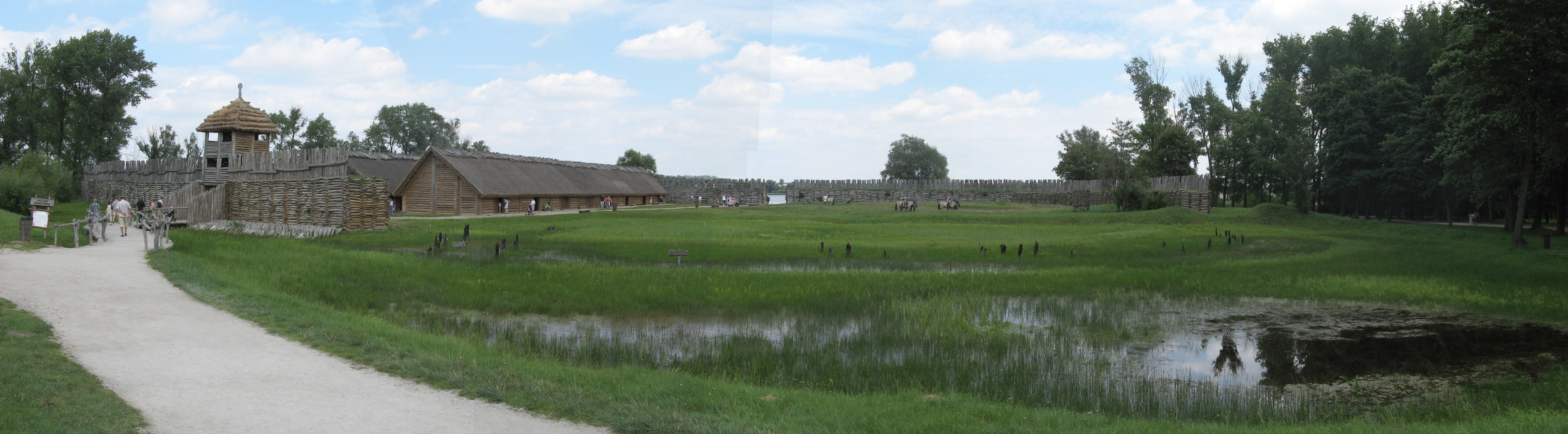 Biskupin - archeopark, rekonstrukce osady z doby bronzové. Složeno z 5 snímků programem hugin.